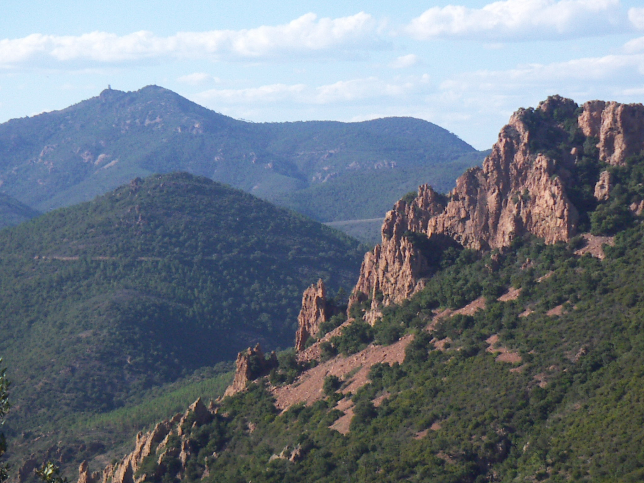 Im Estérel-Gebirge